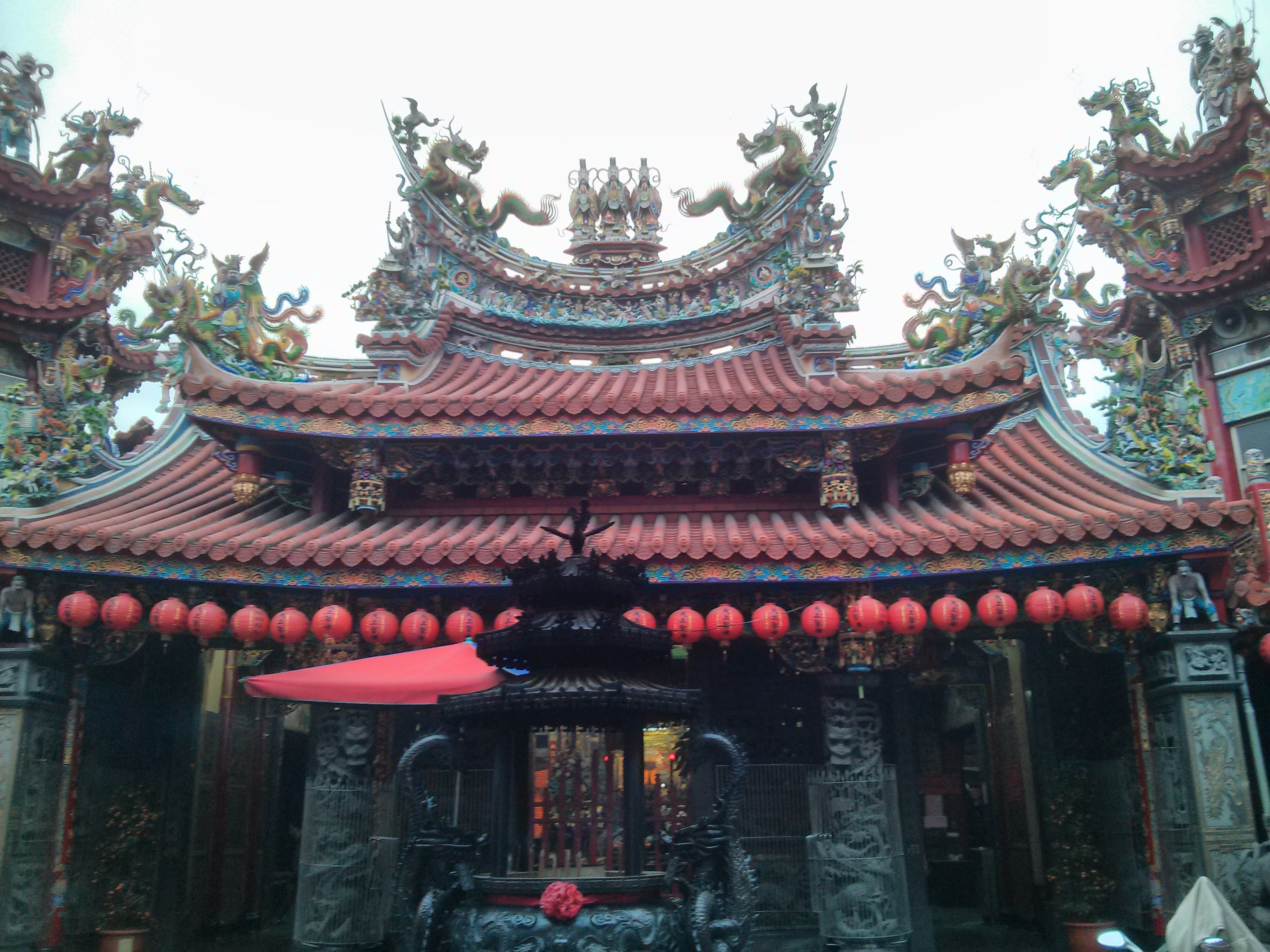 鳳山雙慈亭